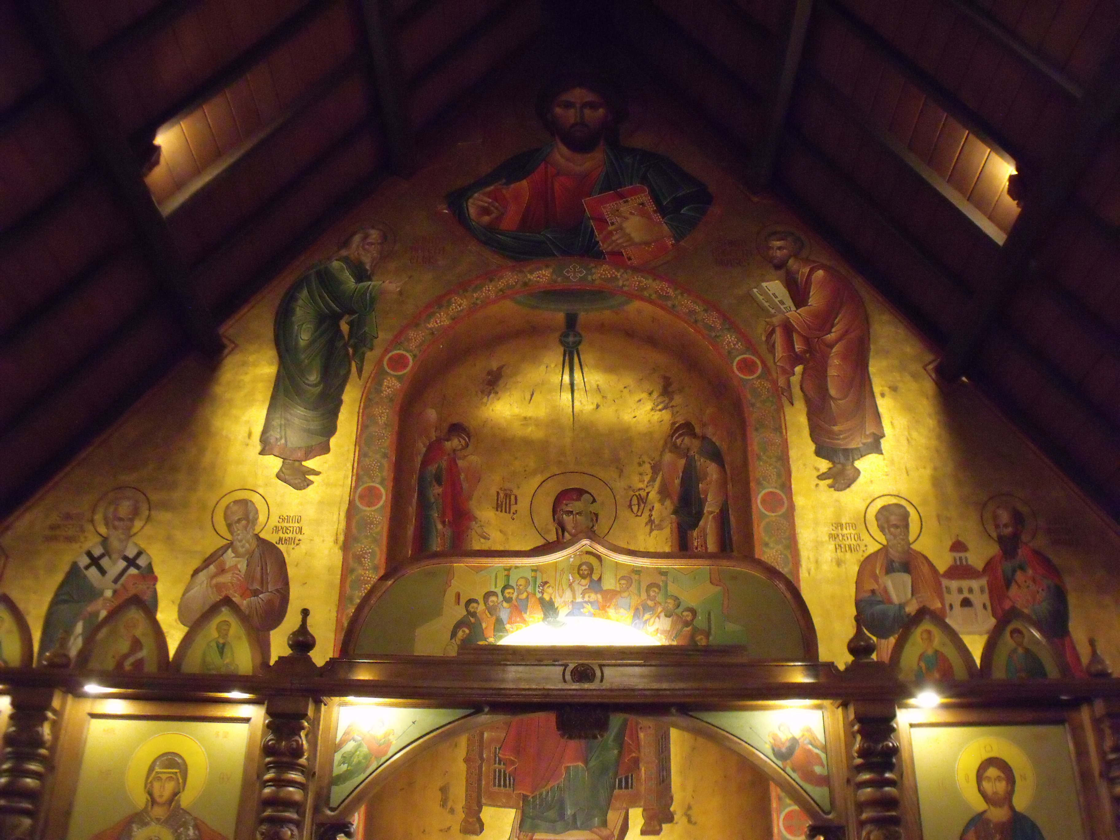 mural 3 superior